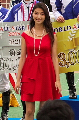 WASJ表彰式 (橋本マナミ)